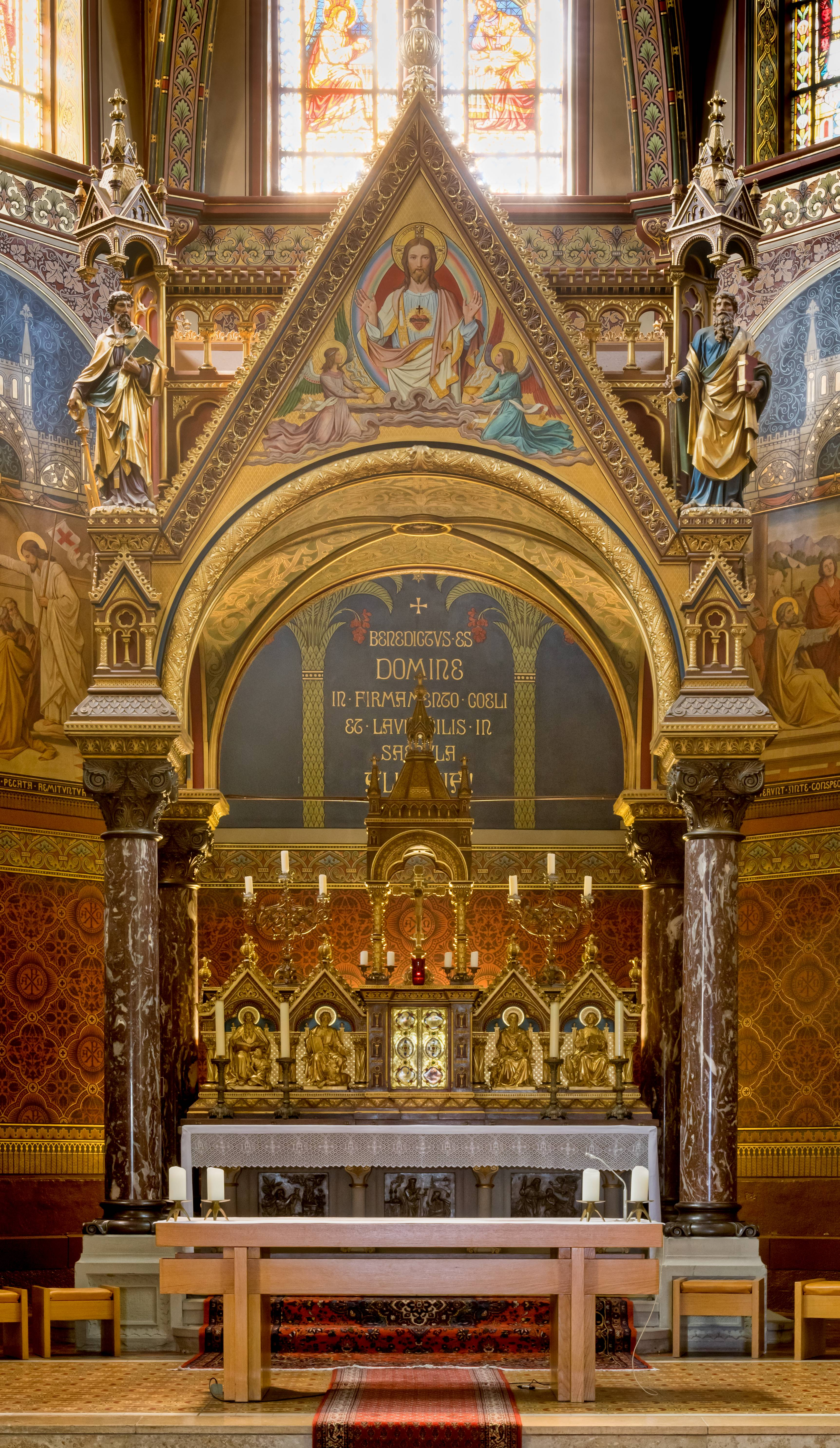 St. Peter und Paul in Bonndorf Der Hauptaltar